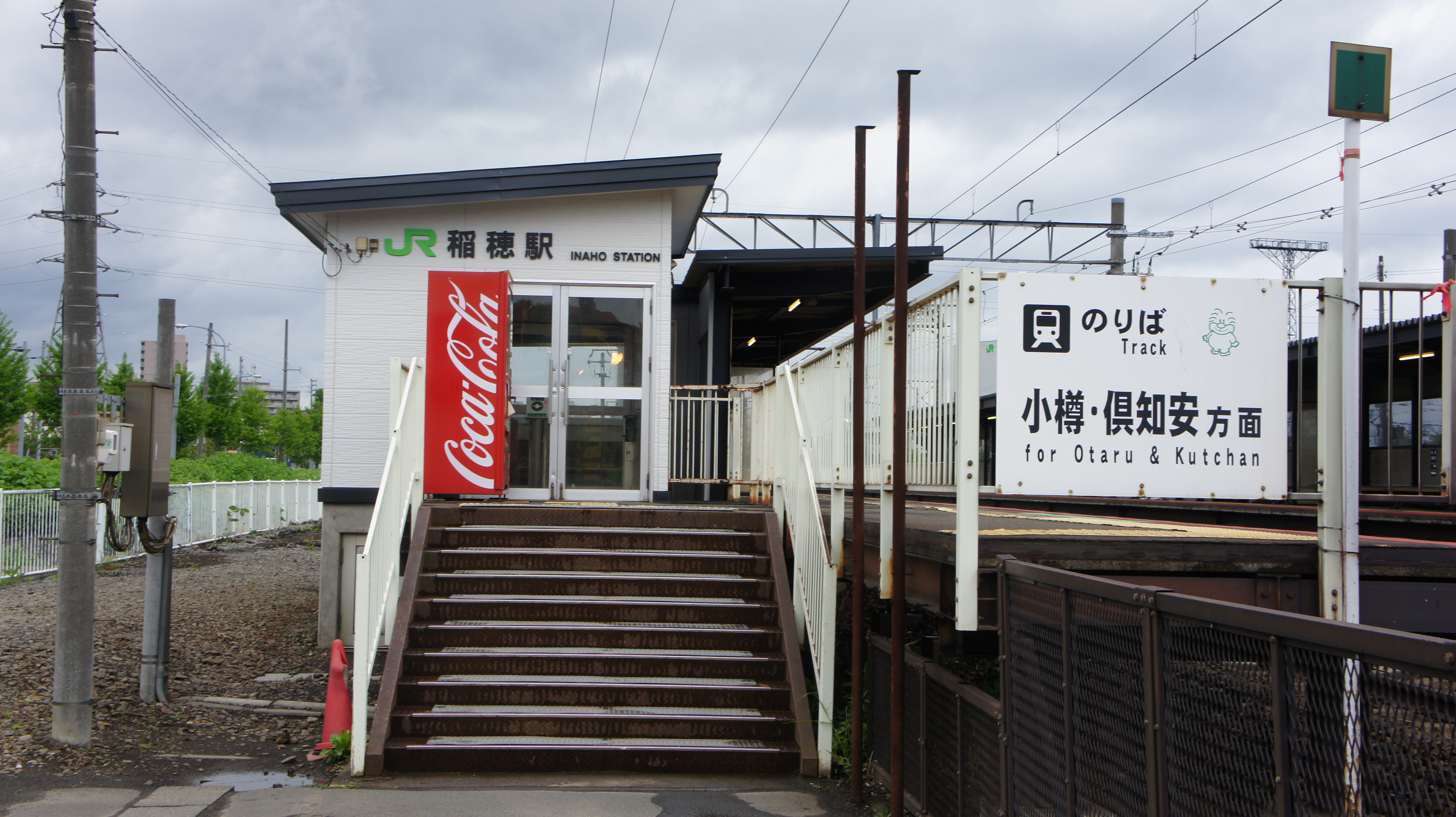 JR函館本線・稲穂駅の駅舎（小樽・倶知安方面のりば） Sony NEX-3